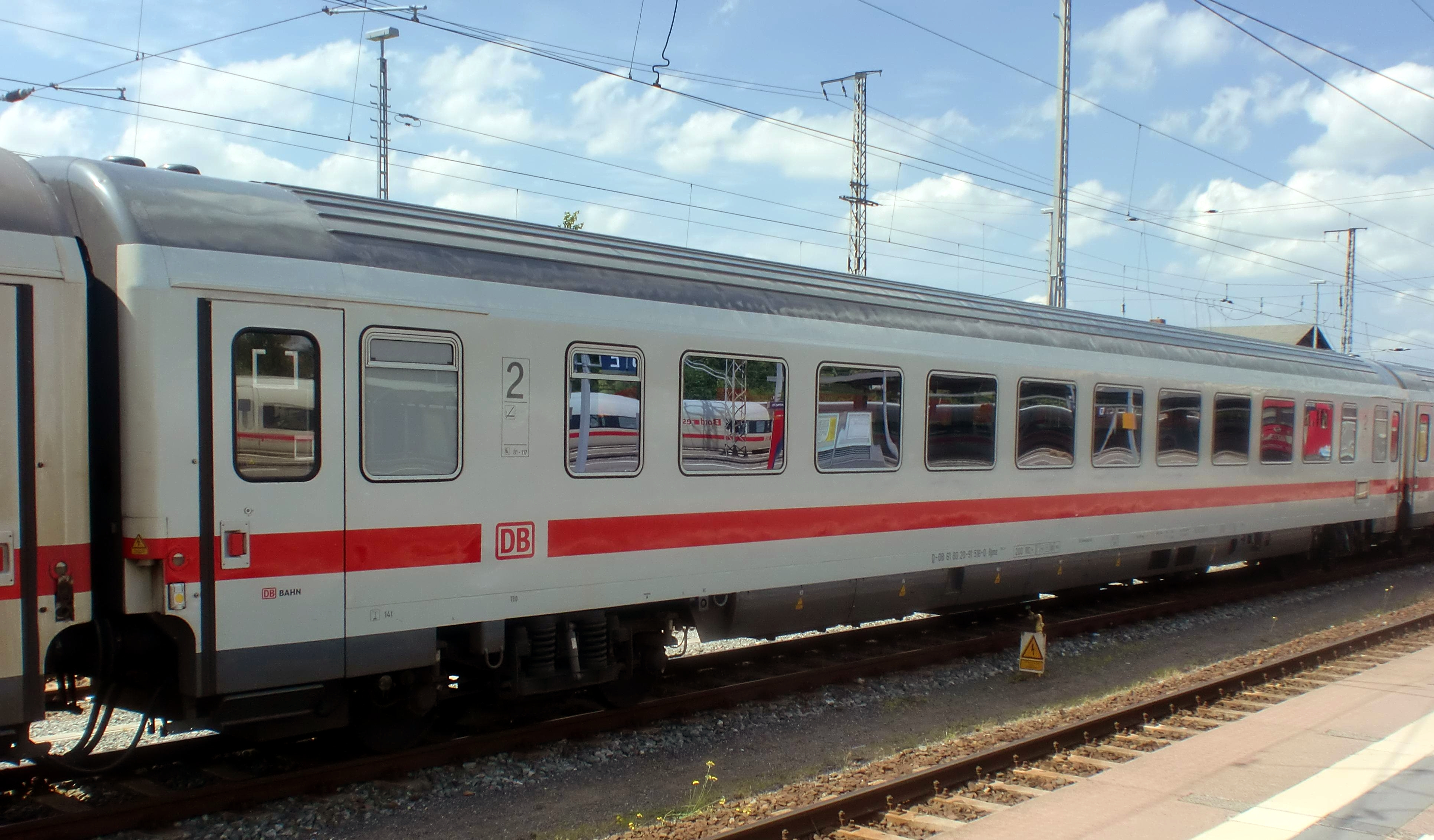 Bpmz 294.5 (D-DB 61 80 20-91 516-0) in Stralsund Hbf